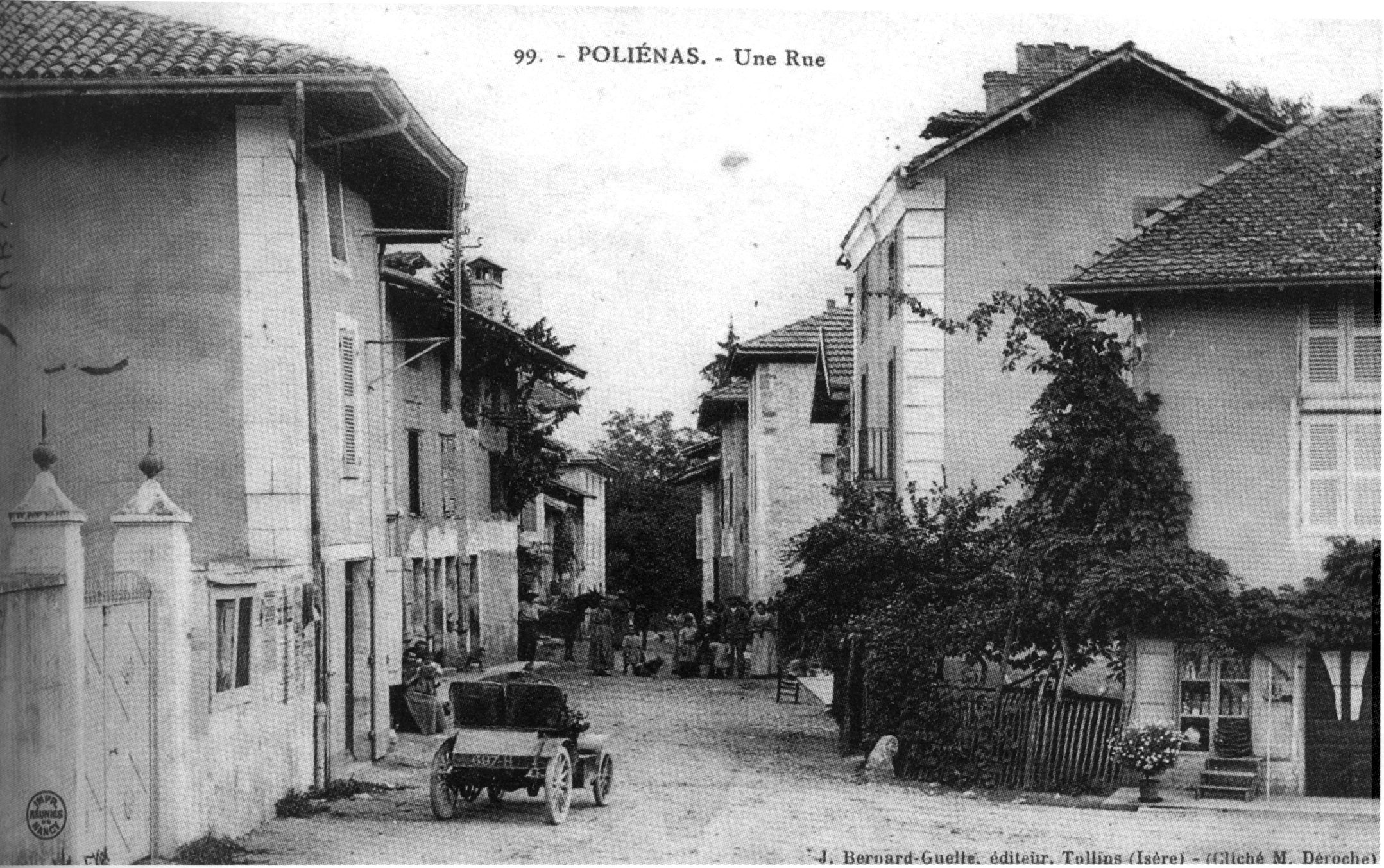 Poliénas, une rue, 1912